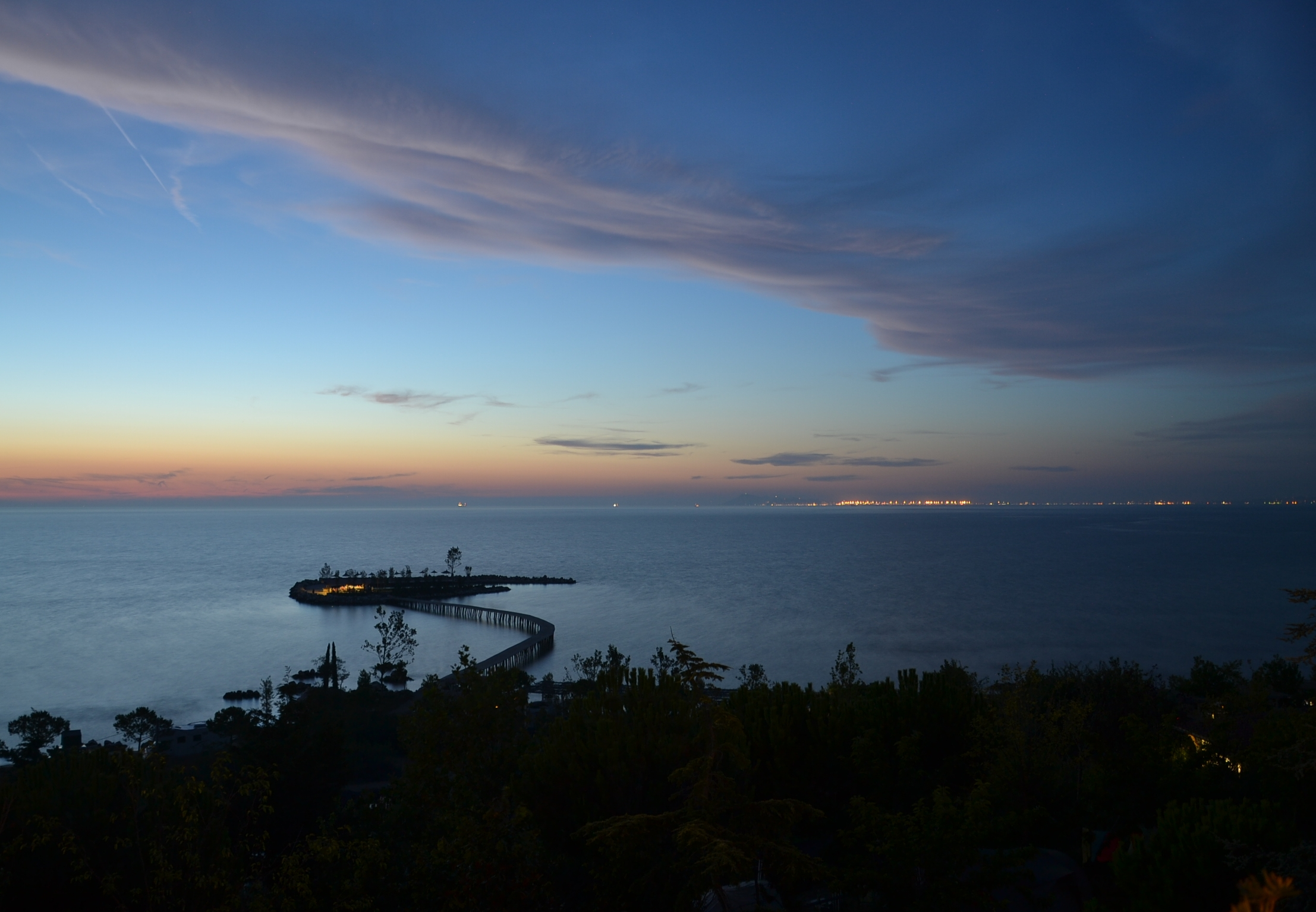 Evening in Albania, near Durrës